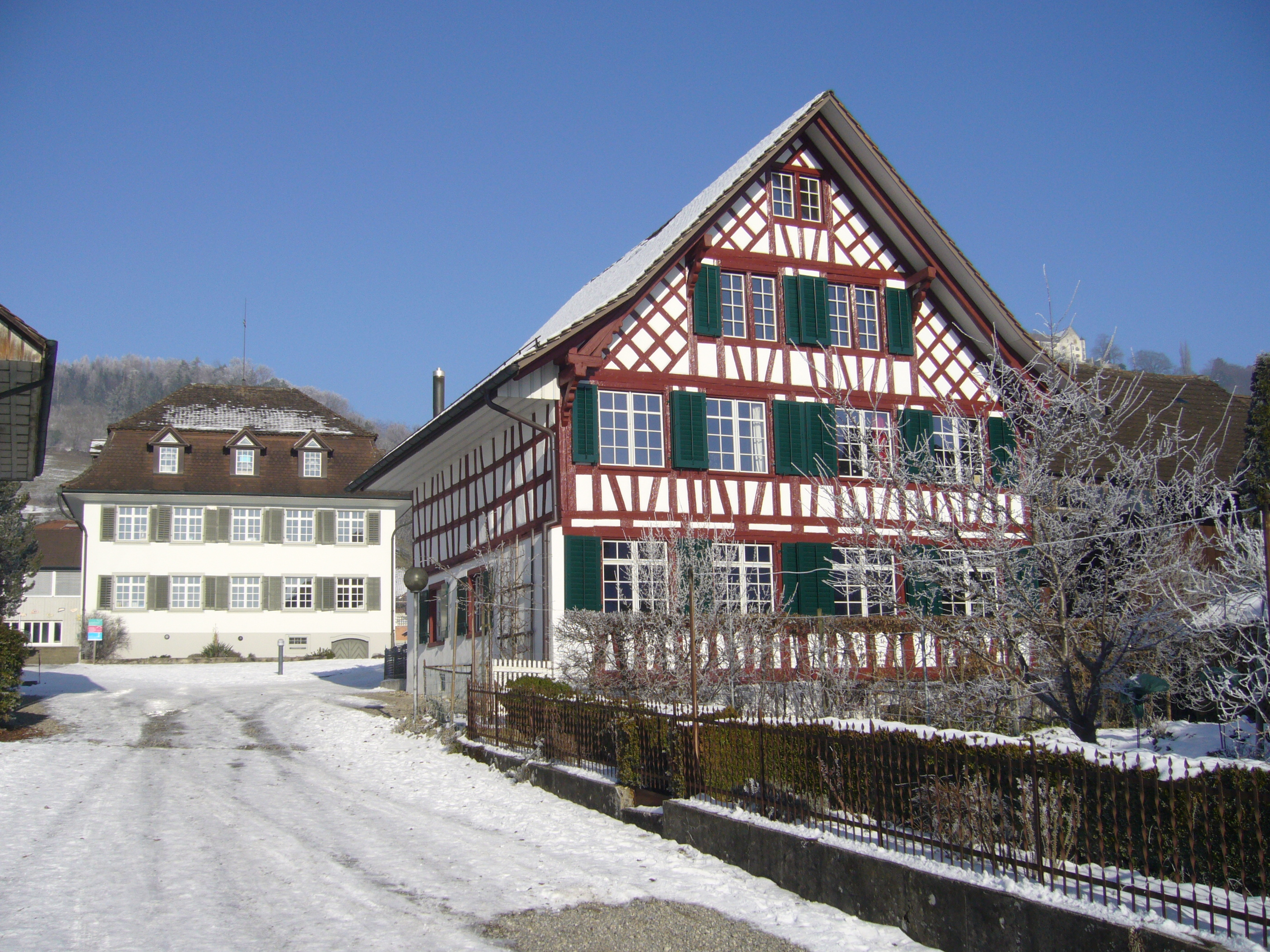 Häuser im Dorfkern zu Stettfurt; rechts oben im Hintergrunde das Schloss Sonnenberg.